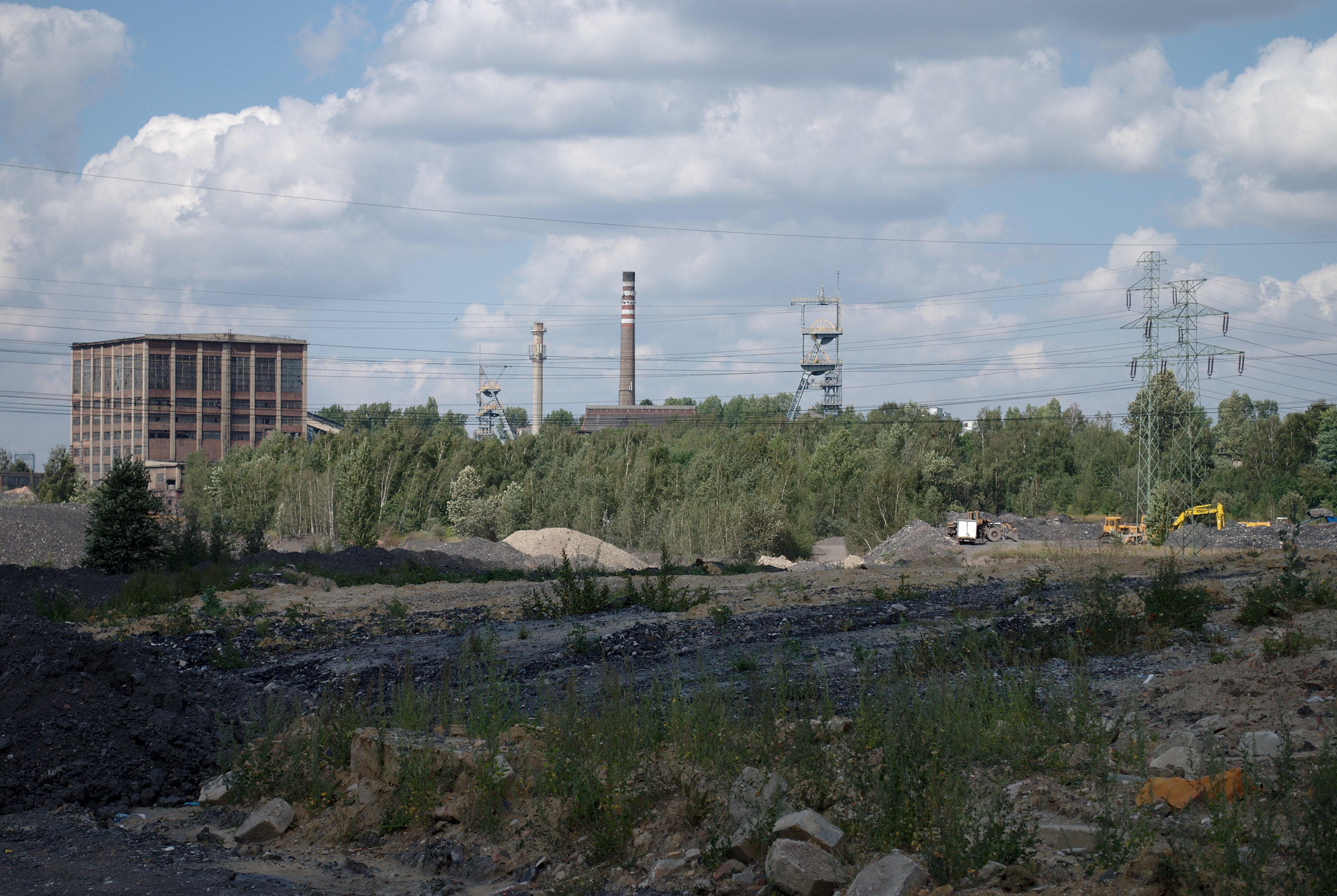 Ruda Śląska. KWK Halemba-Wirek, ruch Wirek.